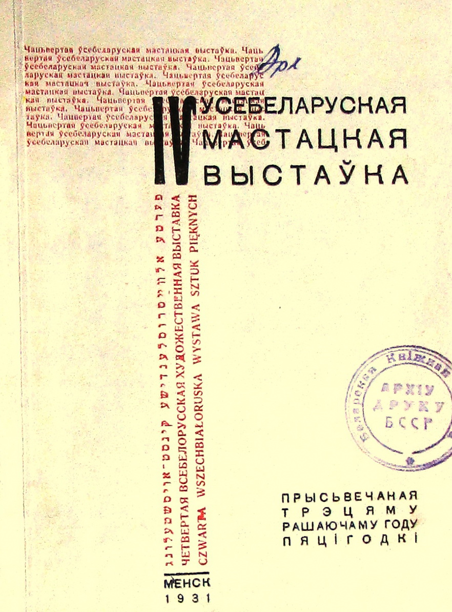 IV Усебеларуская мастацкая выстаўка. Каталог (вокладка)